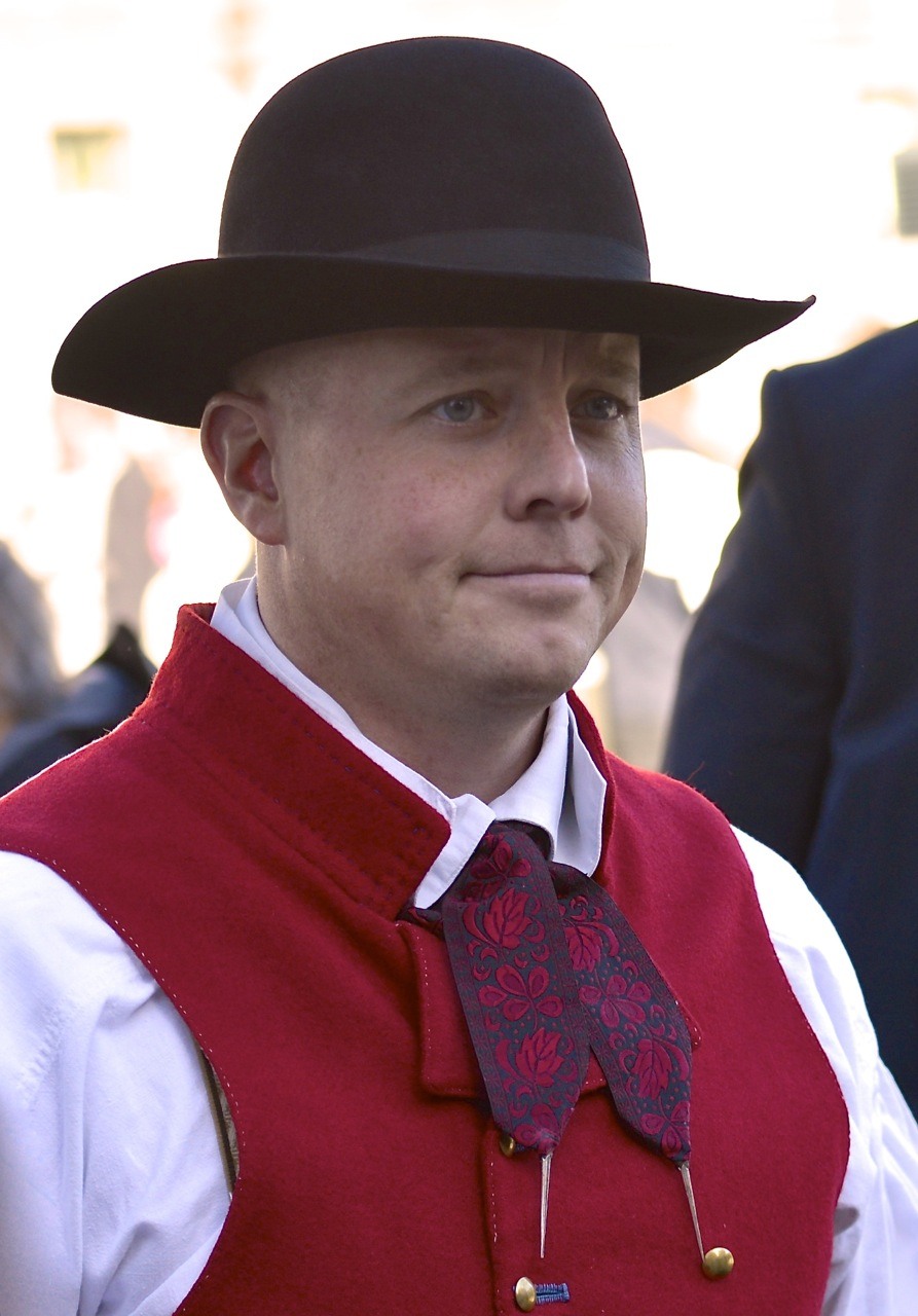 Björn Söder inför Riksmötets öppnande den 30 september 2014.